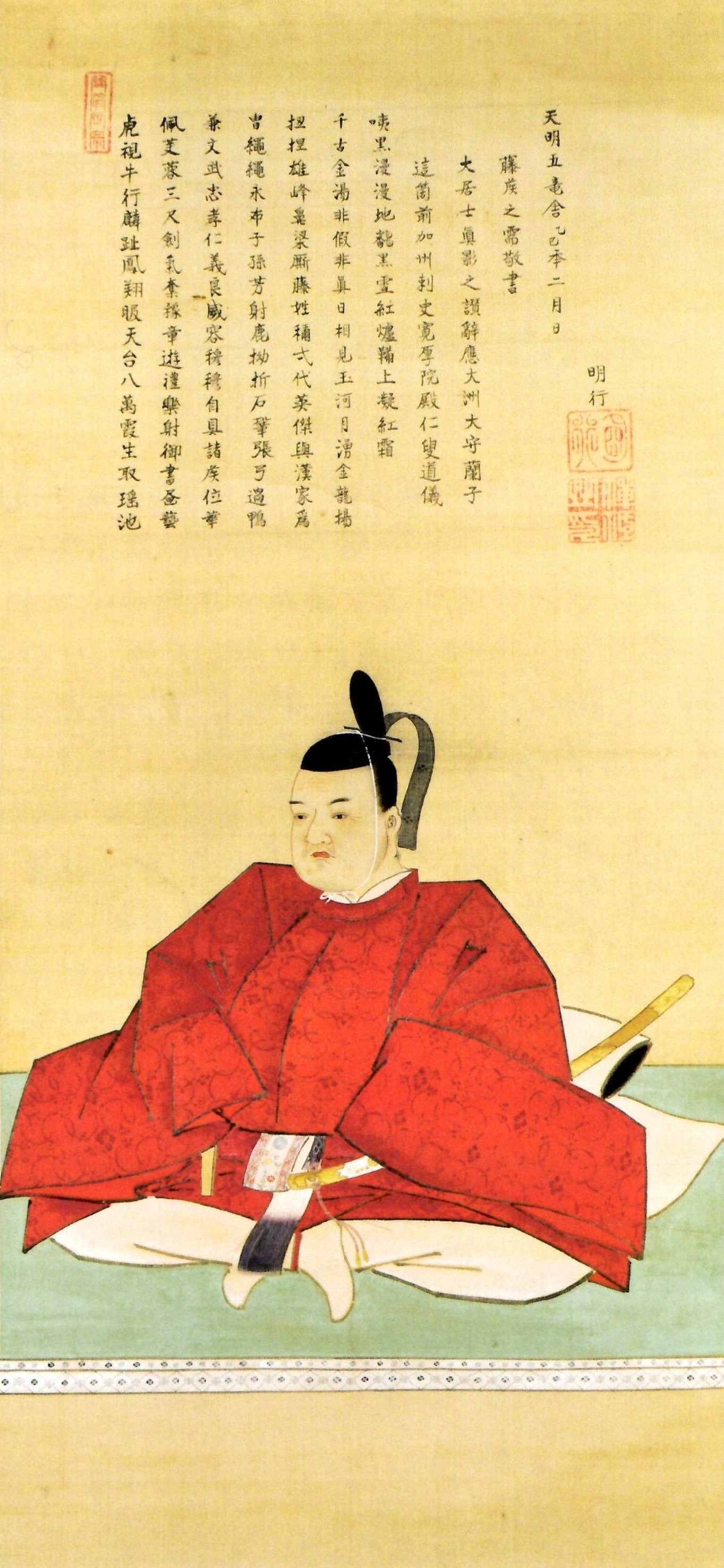 加藤泰衑の肖像。